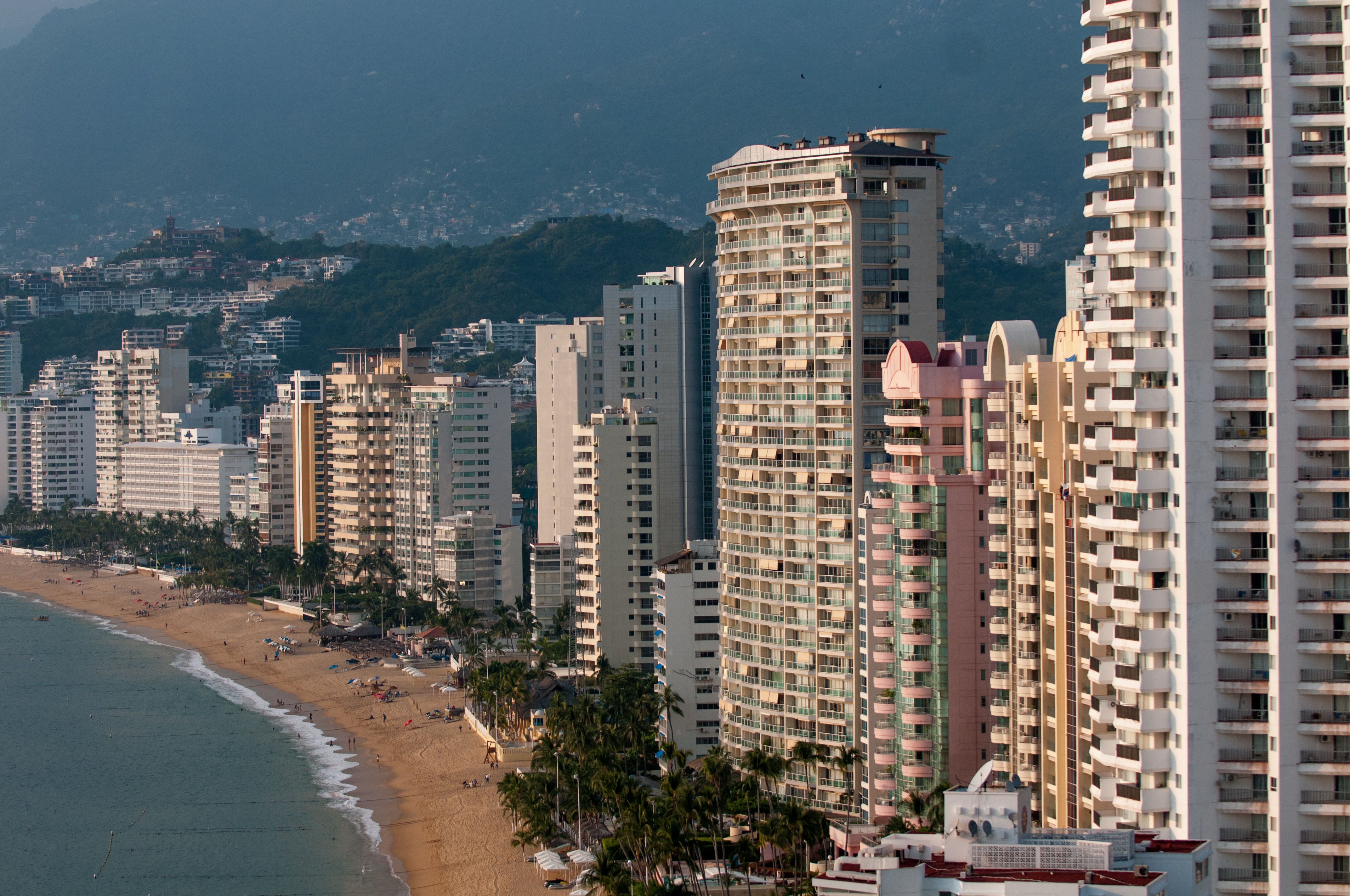 Comenzó como un proyecto turístico de Miguel Alemán. Se convirtió en un bodrio de urbanización.